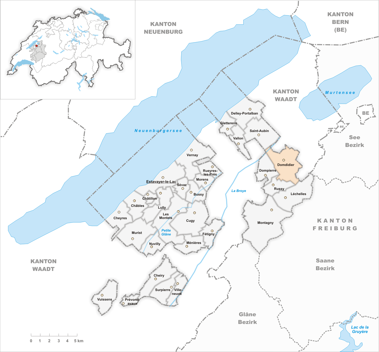 Municipality Domdidier